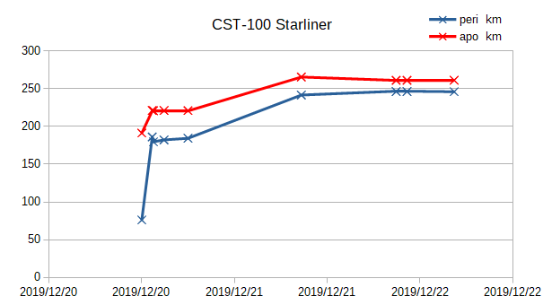 Starliner detekované apo a perigeum, zdroj